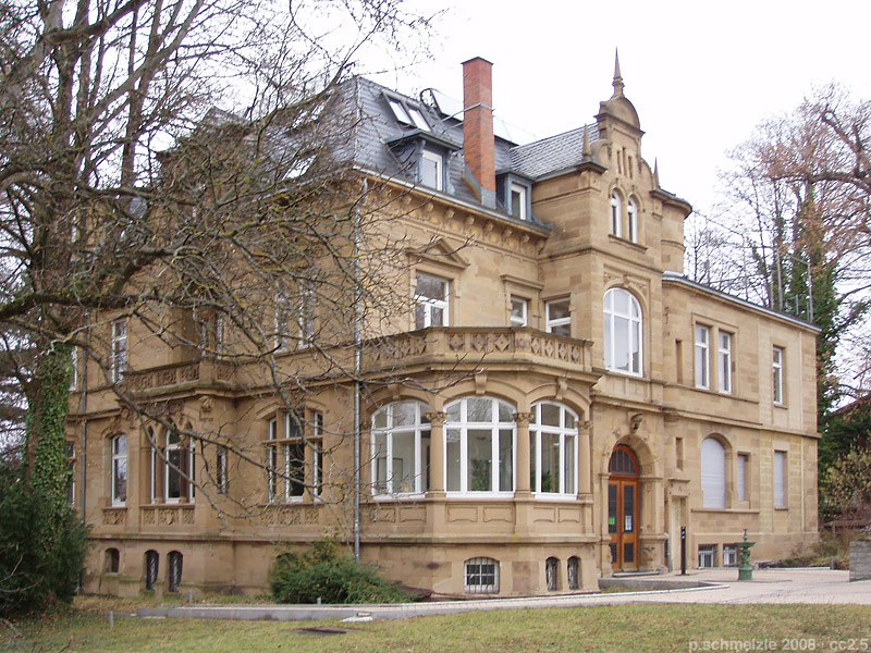 Denkmalgeschütztes Gebäude Villa Knorr in der Bismarckstr. 50 in Heilbronn